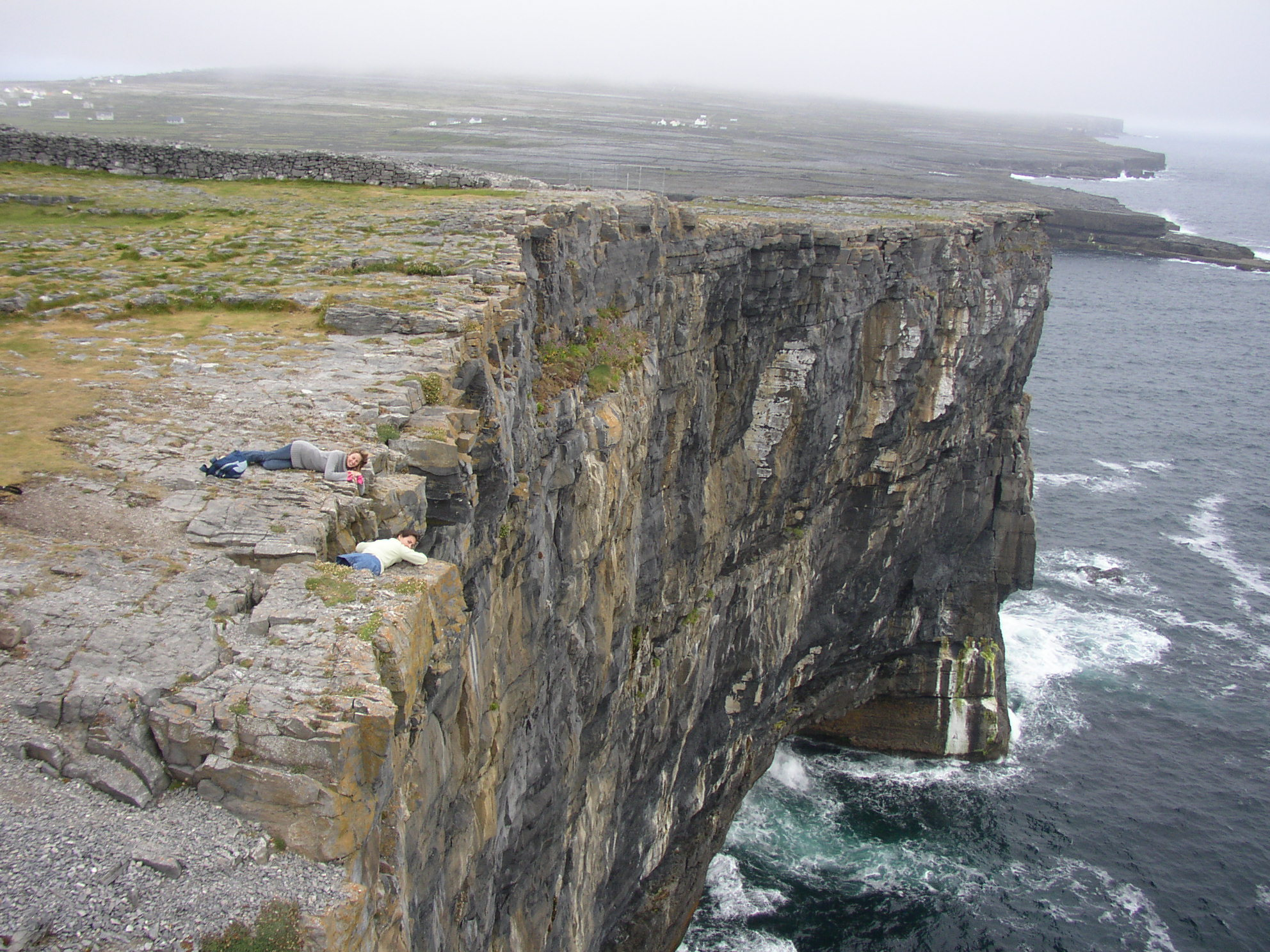 Acantilados das Illas Aran (Irlanda, 2004)